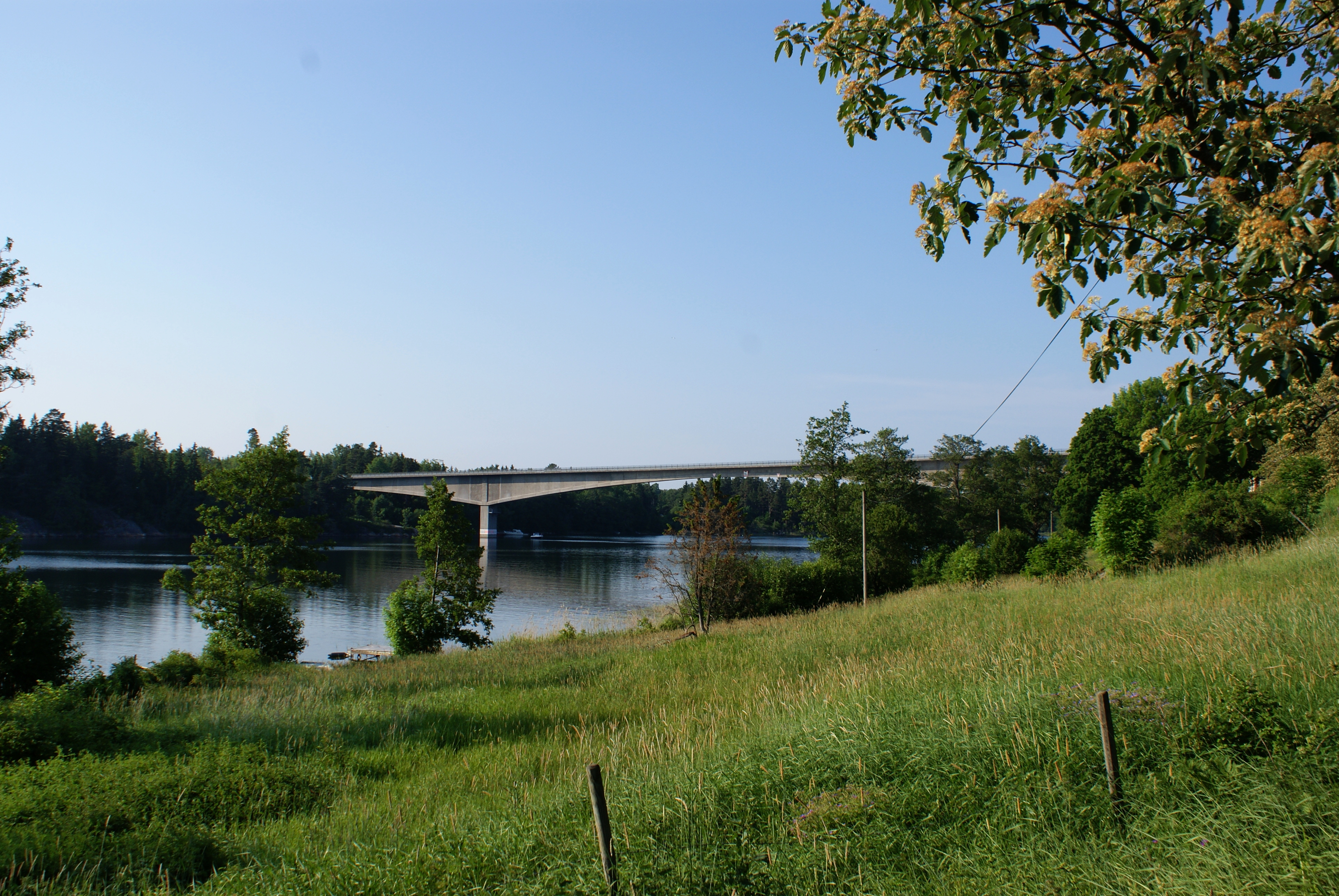 Bron över till Vätö sedd från Vätö kyrka. This file was made possible through a cooperation with the Cloudberry project.